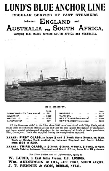 Advertisement